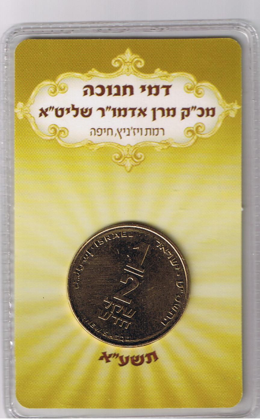 דמי חנוכה מהאדמו"ר מויז'ניץ, חנוכה תשע"א